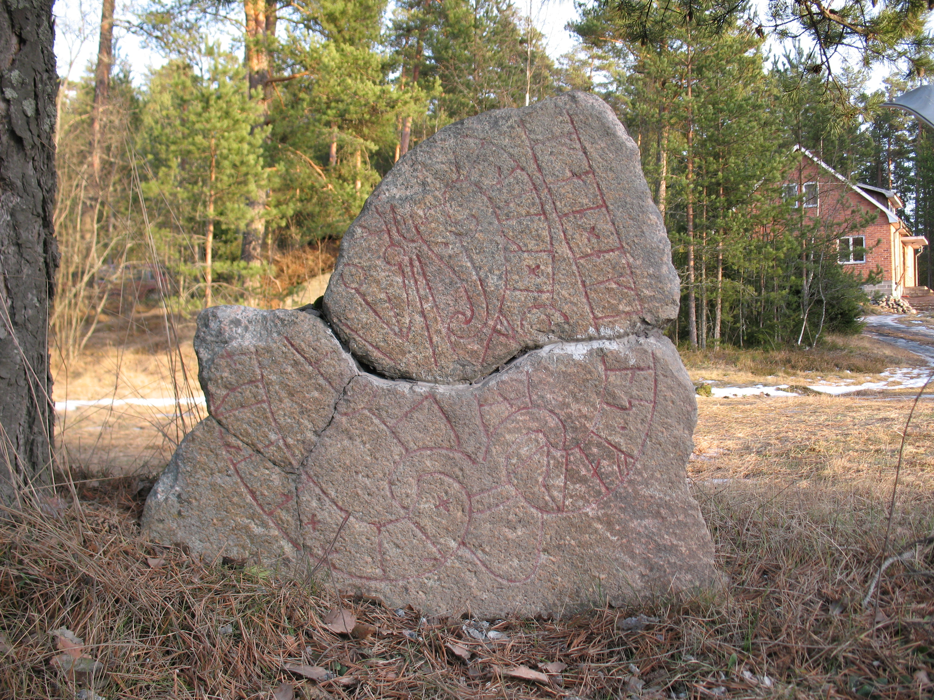 Runestone U 1181.